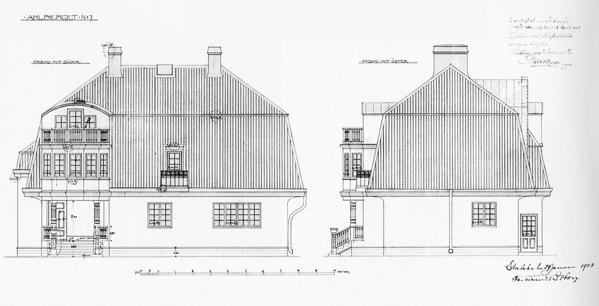 Fasadritningar till Ahlberget 7 (Villa Vintra), Bobergs hem